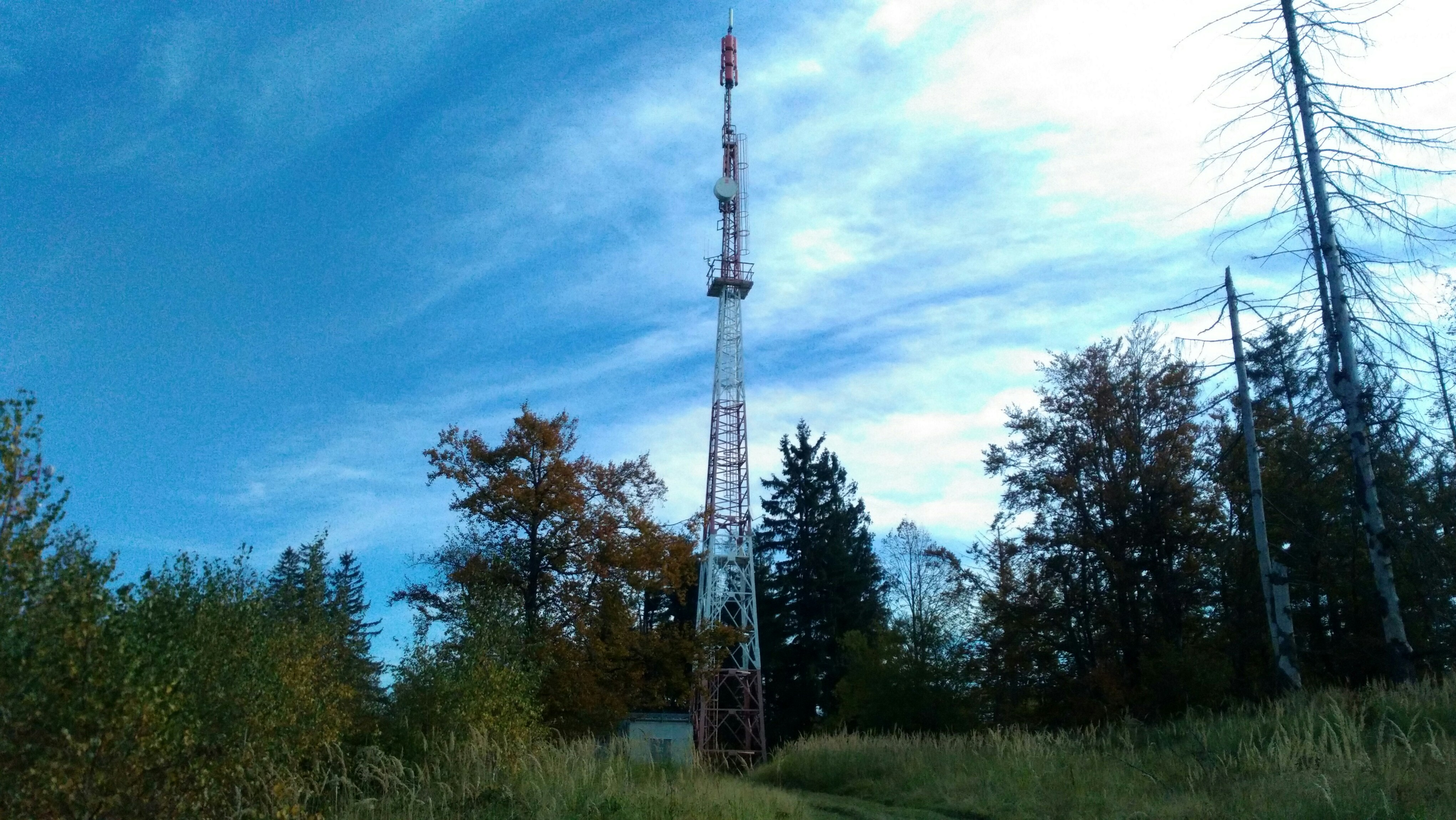 Televízny vysielač na vrchole kopca Briava v Javorníkoch nad mestom Čadca.